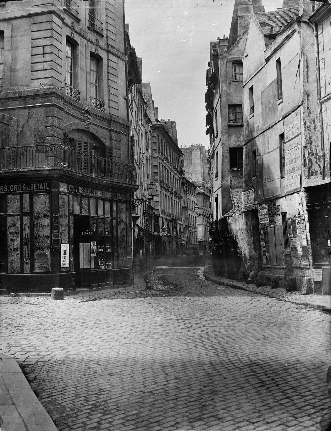 Rue du Four, de la rue de l'Ecole-de-Médecine